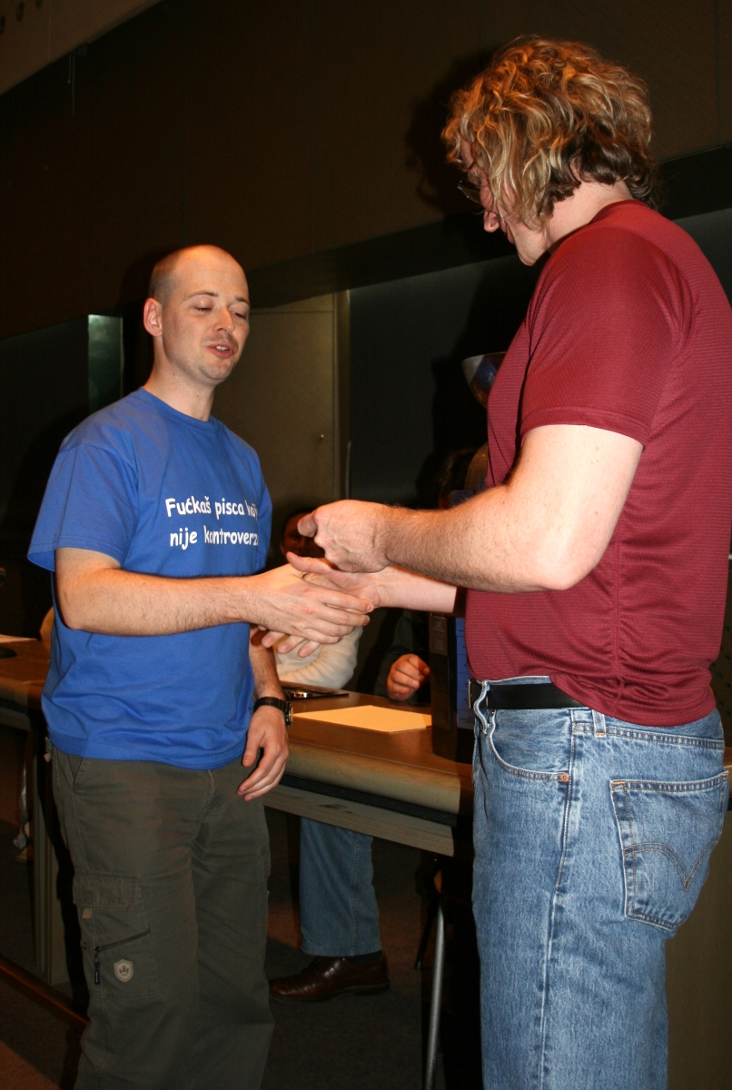 SFeraKon, Zagreb